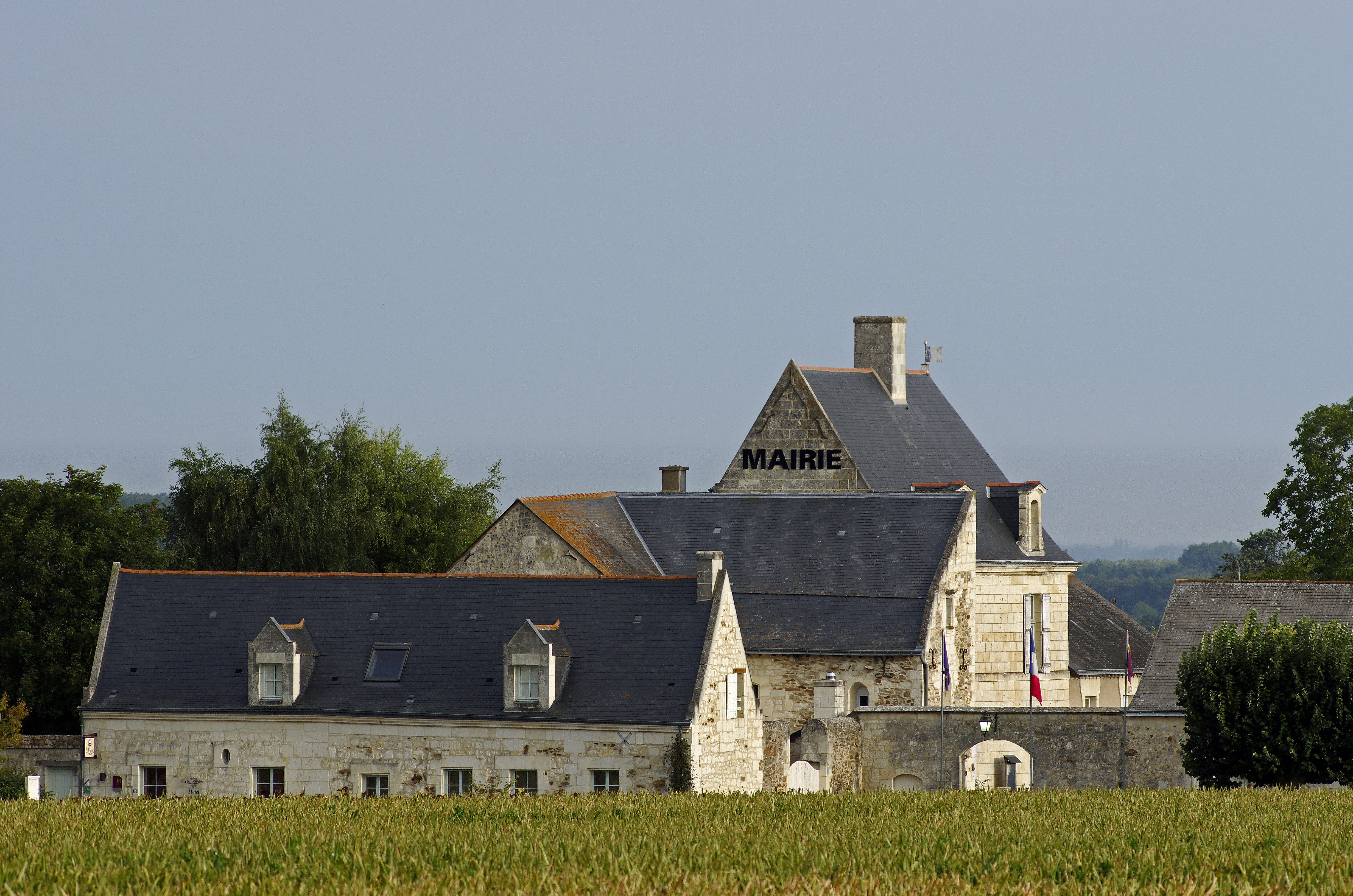 Gennes-Val-de-Loire (Maine-et-Loire) Saint-Georges-des-Sept-Voies, commune déléguée de Gennes-Val-de-Loire. Manoir de la Sansonnière. Une grande maison du XVIIIème siècle est devenue le siège de la Mairie en 1874. Le domaine, dont plusieurs bâtiments remontent au XVIème siècle, est entouré d'une enceinte de murs flanquée de trois pavillons d'angles. Le domaine abrite l'école, la salle communale et une auberge.